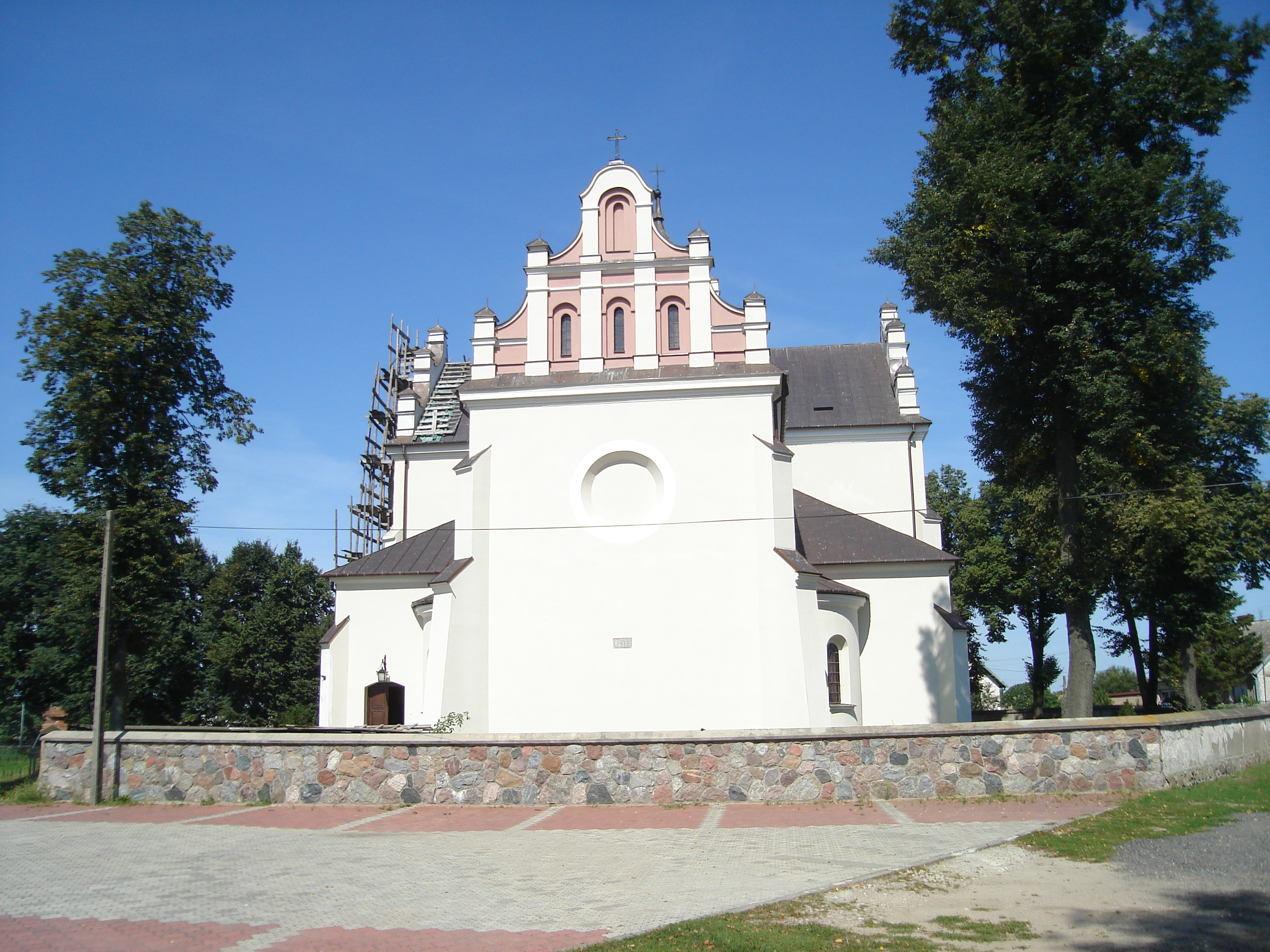 Kościół w Sieluniu. Widok z tyłu